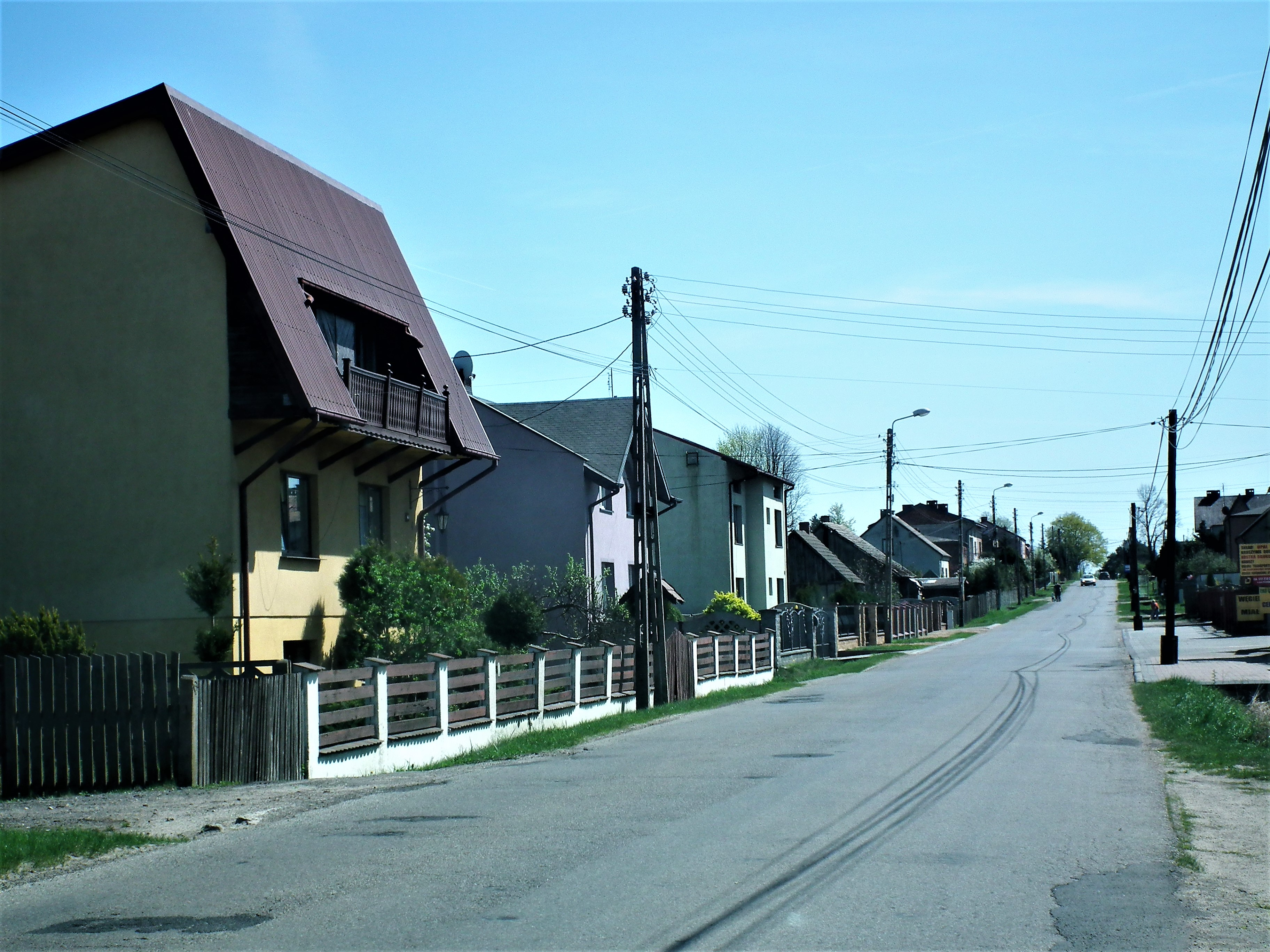 Wieś Bór Zapilski, śląskie.